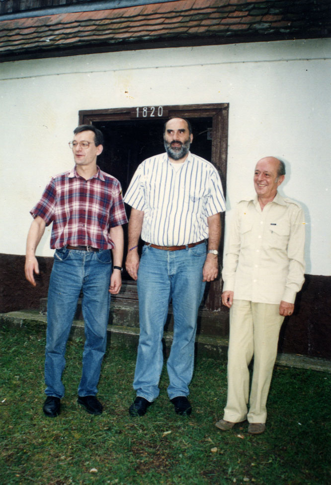 Dobitnici nagrade Braća Micić u Majskom Poljanama, na Baniji 1995. godine